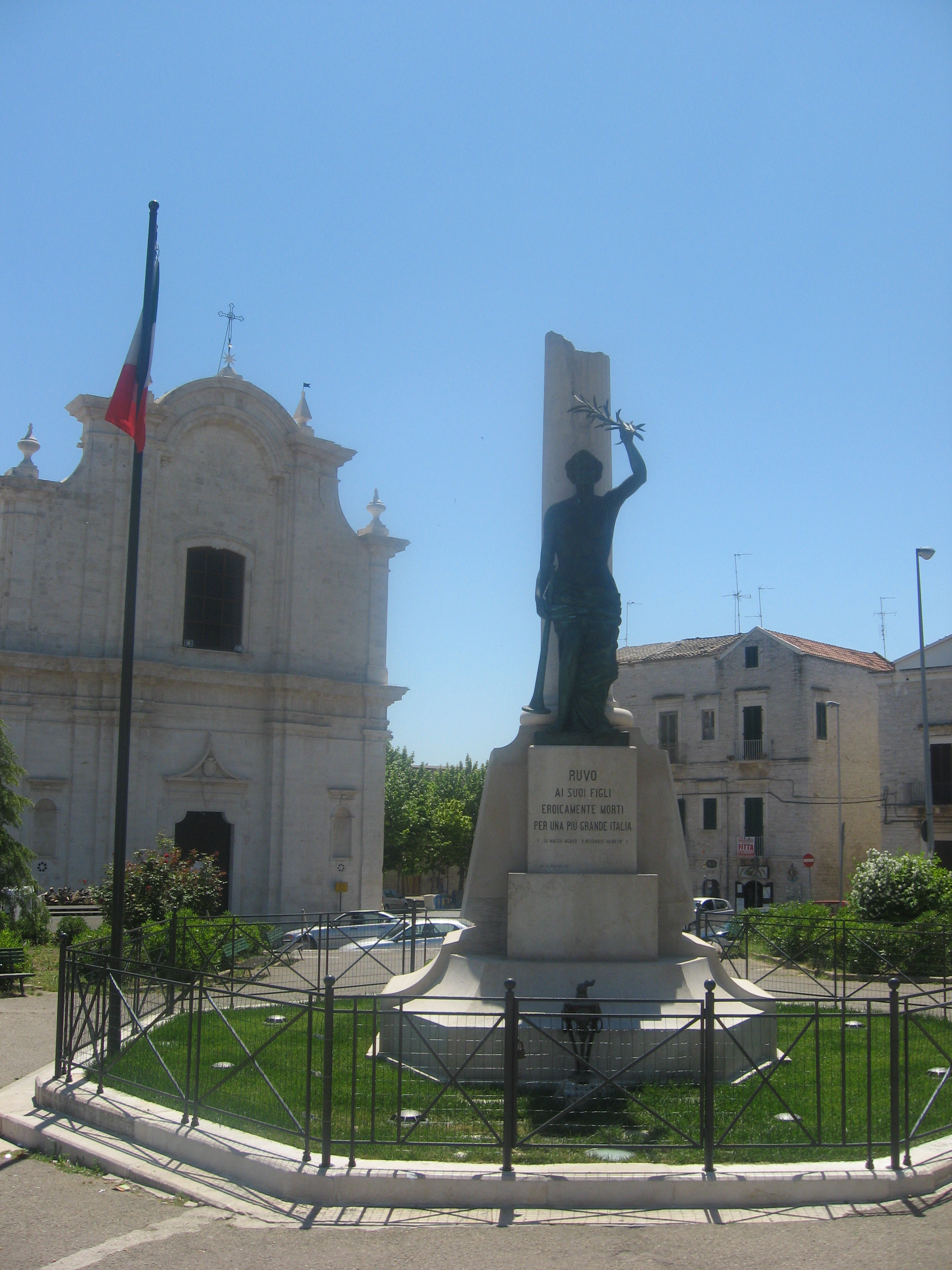 Monumento ai caduti ruvo di puglia 2012